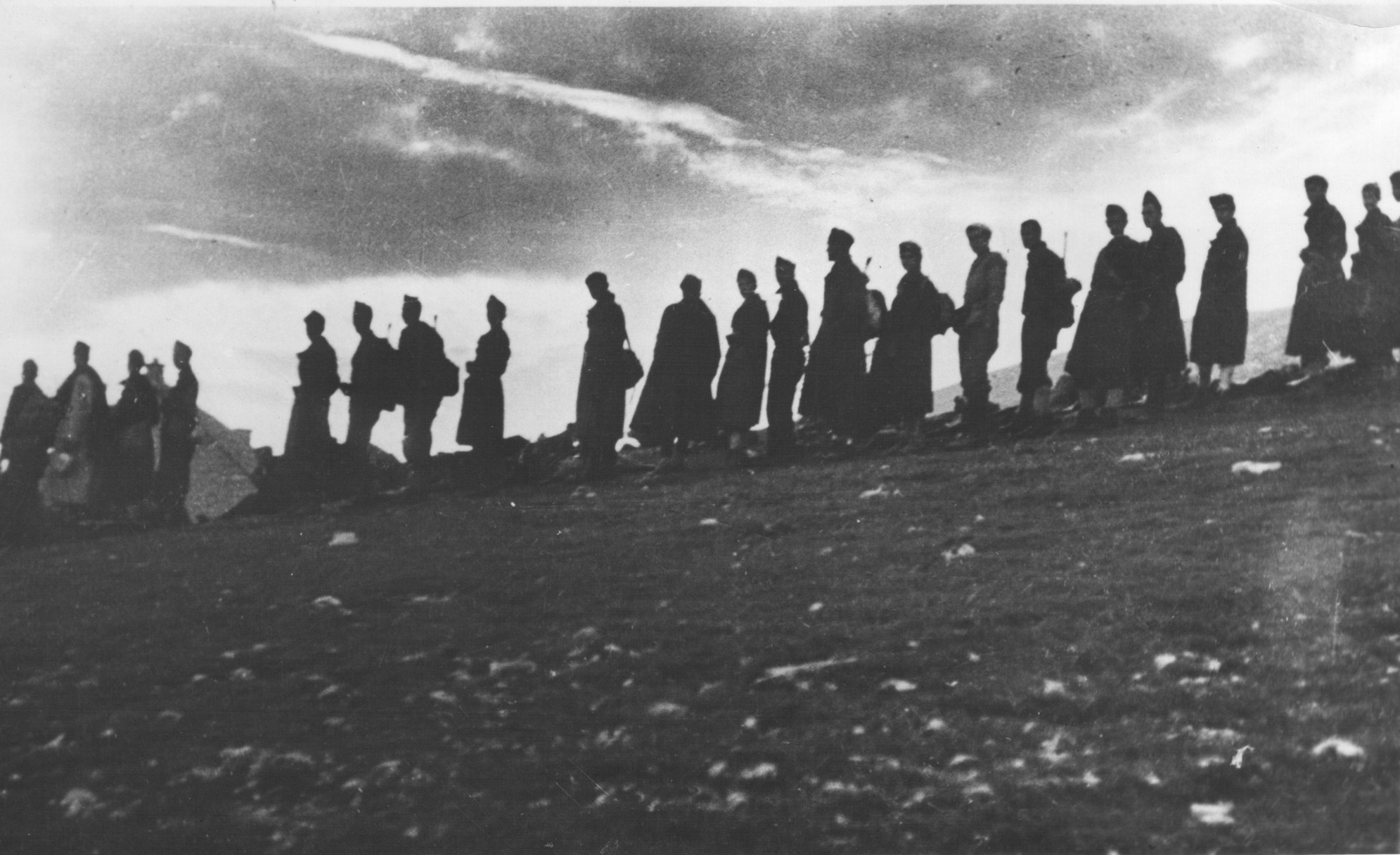 Srpskohrvatski / српскохрватски: Kolona III dalmatinske brigade na Svilaji, septembra 1943.